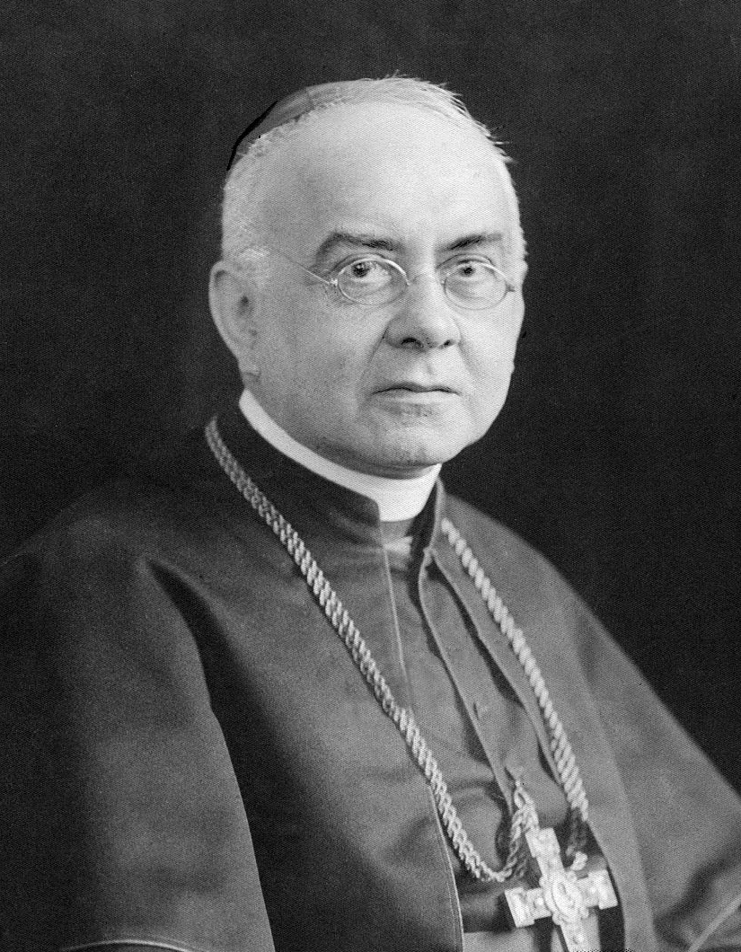 Felix von Hartmann